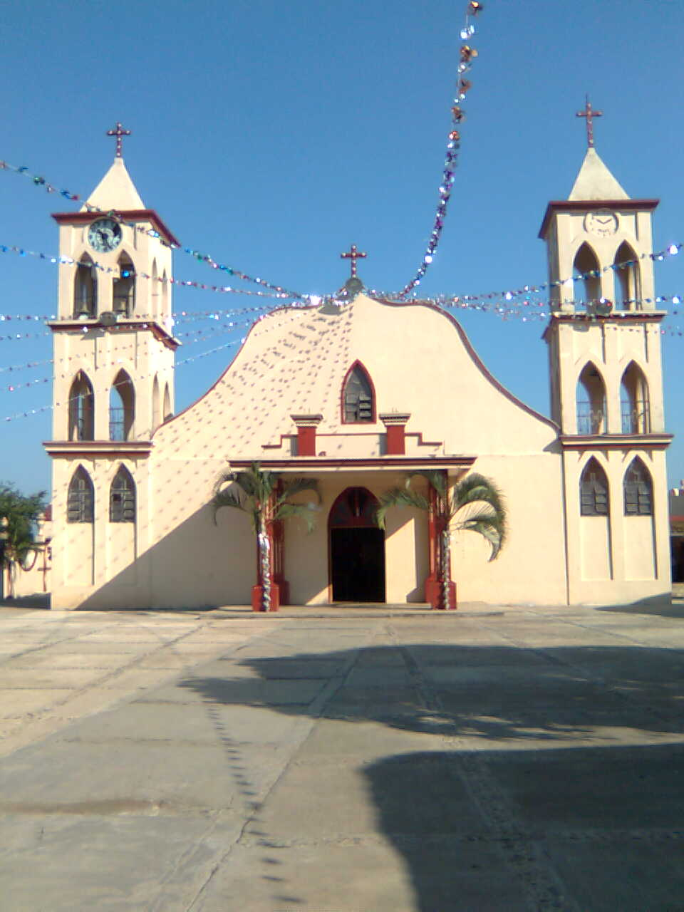 Iglesia San Nicolás Tolentino